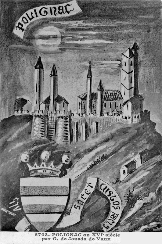 (Château de) Polignac au XVIe siècle par G. (Gaston) de Jourda de Vaux / Polignac castle in the 16th century by Gaston de Jourda de Vaux.